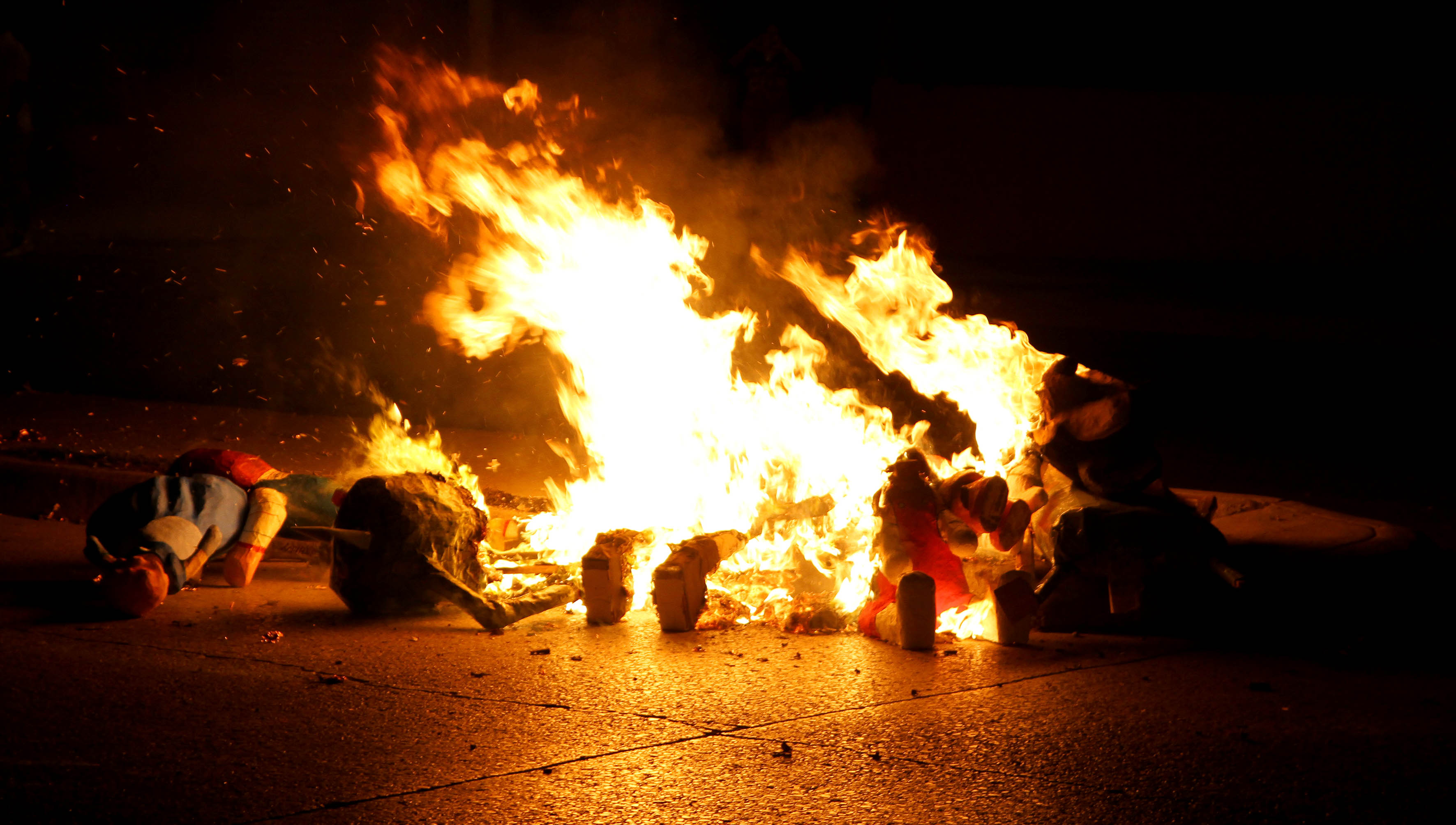 Guayaquil, 01 de enero del 2015 (ANDES).- Guayaquileños realizaron la despedida del año 2014 con la tradicional quema de años viejos Foto:César Muñoz A./ANDES